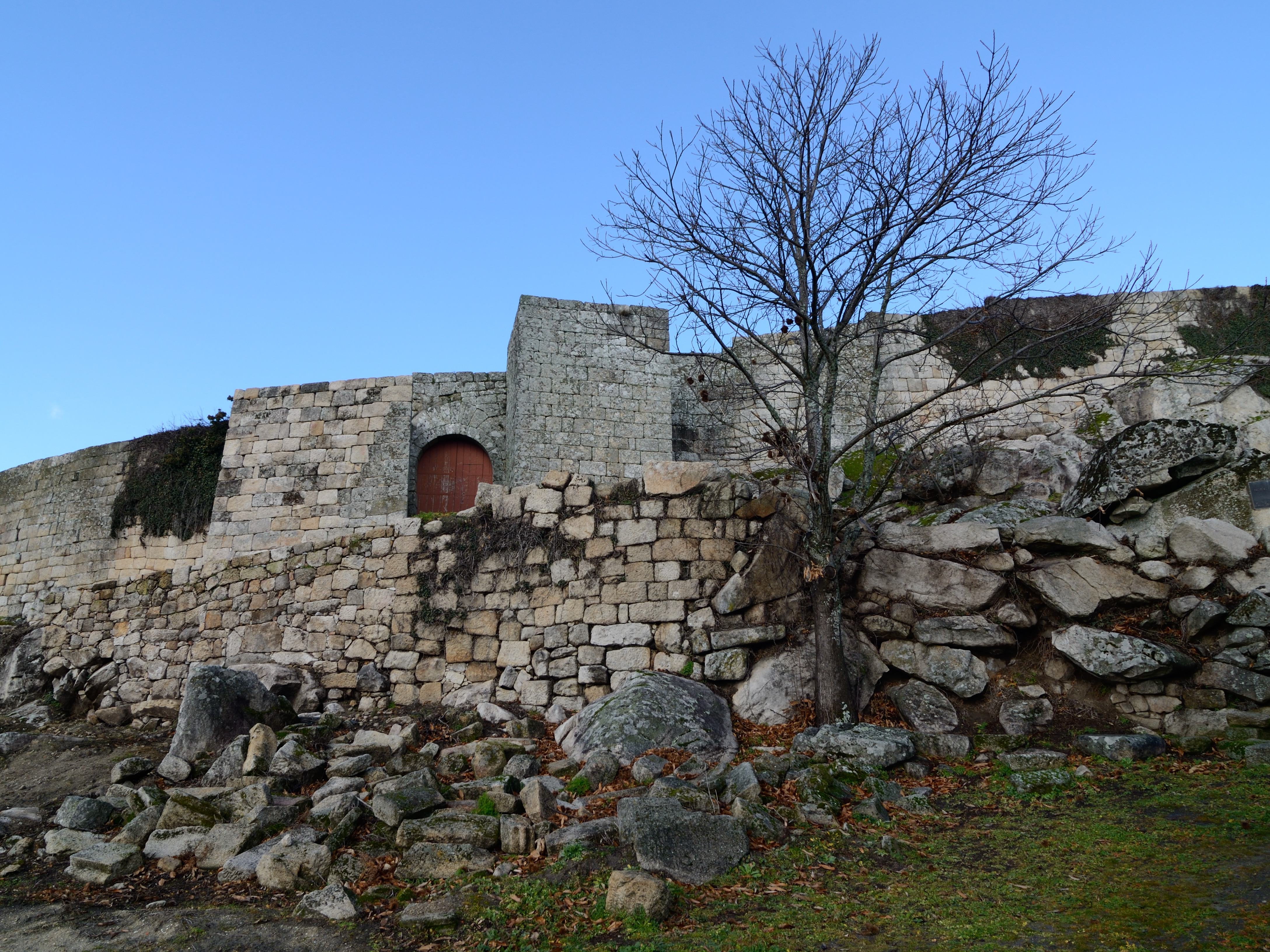 Carrazeda de Ansiães, Portugal [2012]